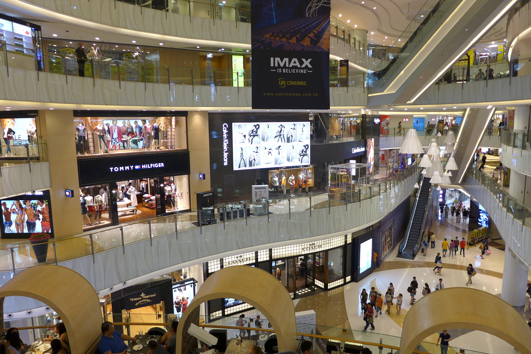 MOKO Atrium